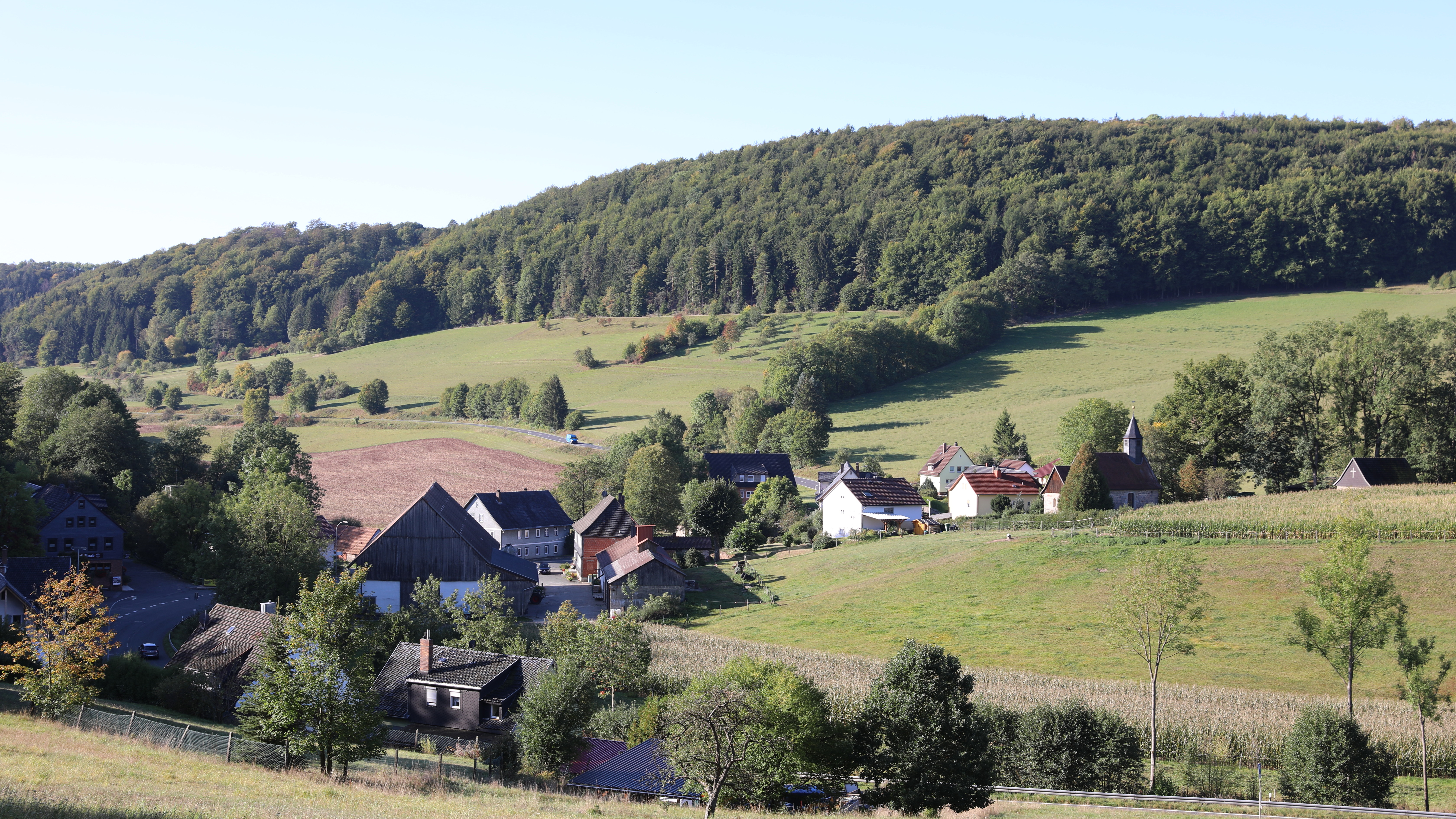 Ostansicht Neukirchen, Ot Lautertal